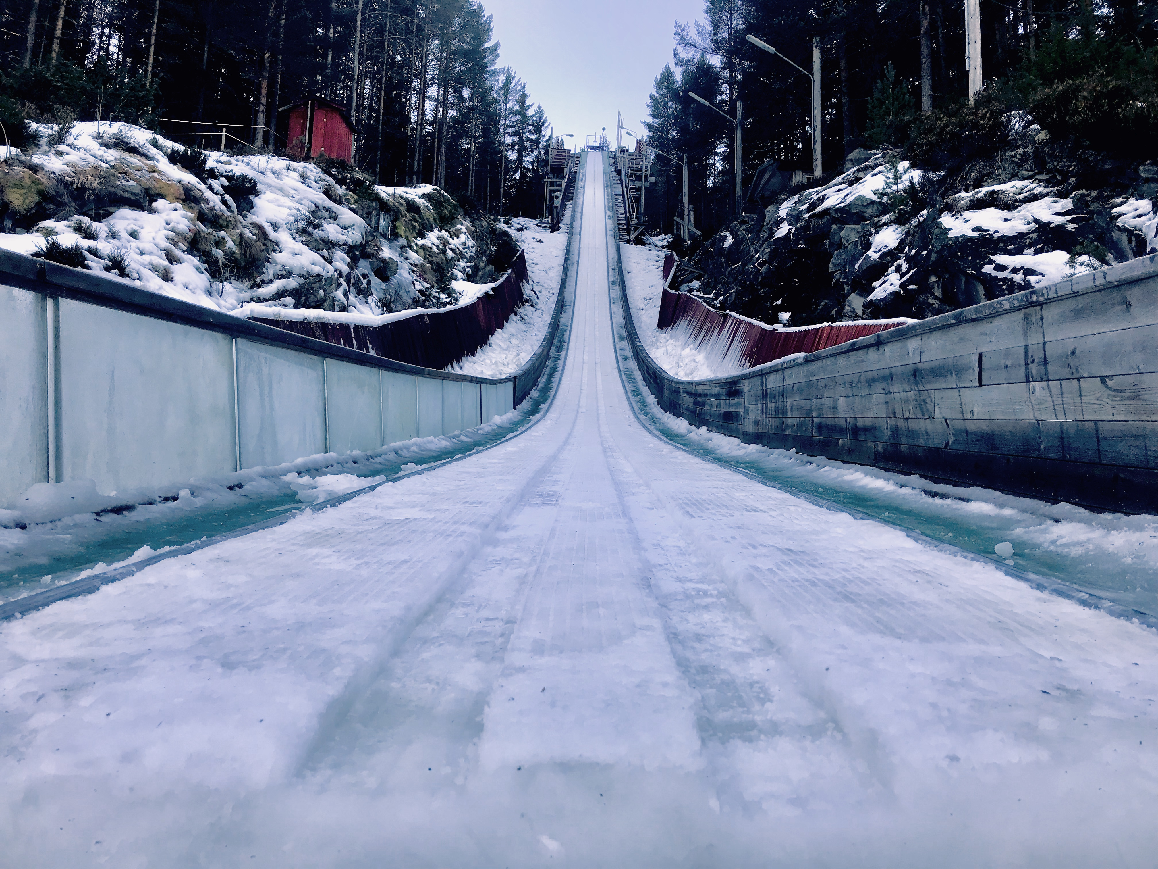 Tatt ved hoppkanten, viser overrennet preppet til konkurranse.